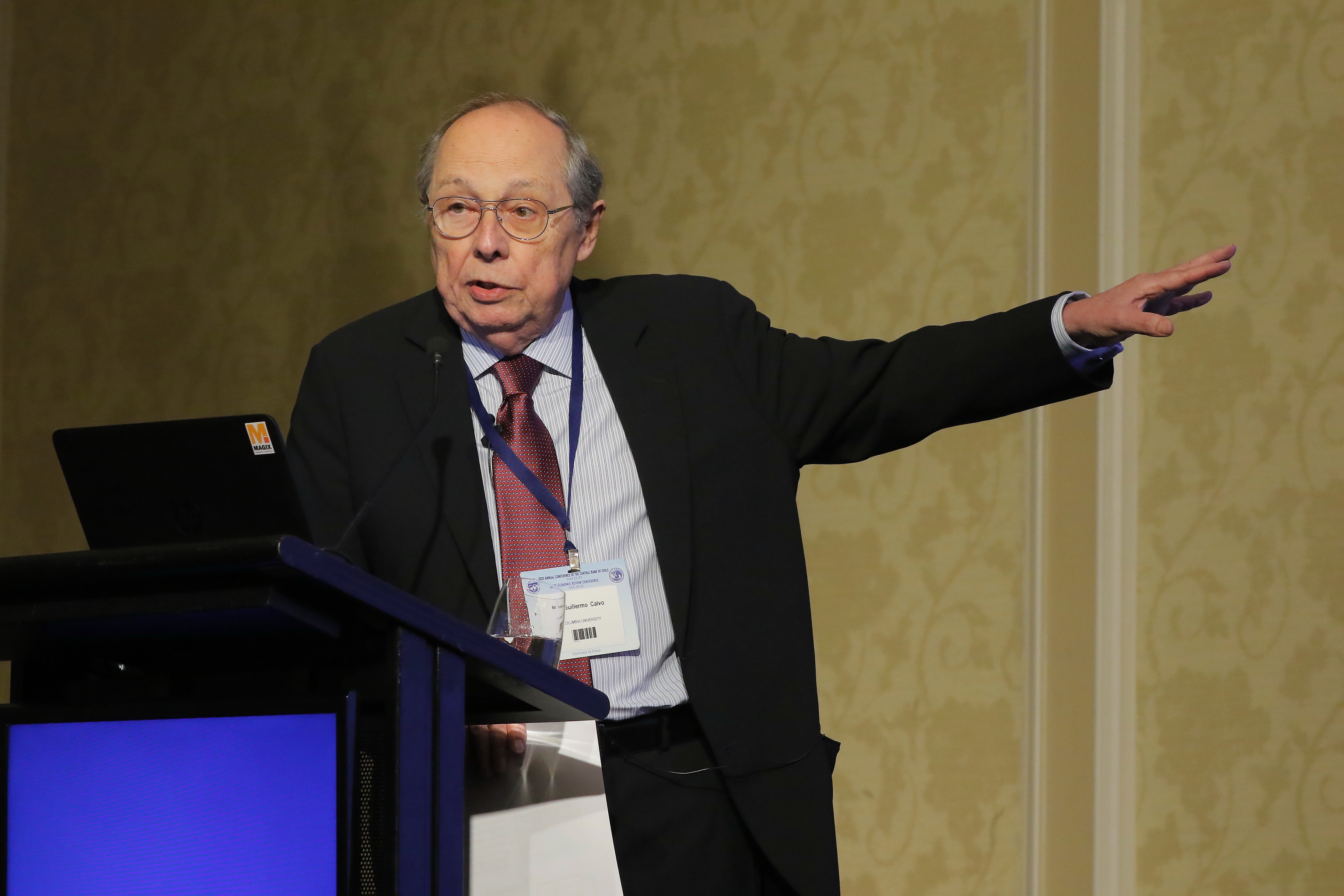 XXIII Annual Conference of the Central Bank of Chile “Independence, Credibility, and Communication of Central Banking”. Santiago, 22 de julio de 2019.